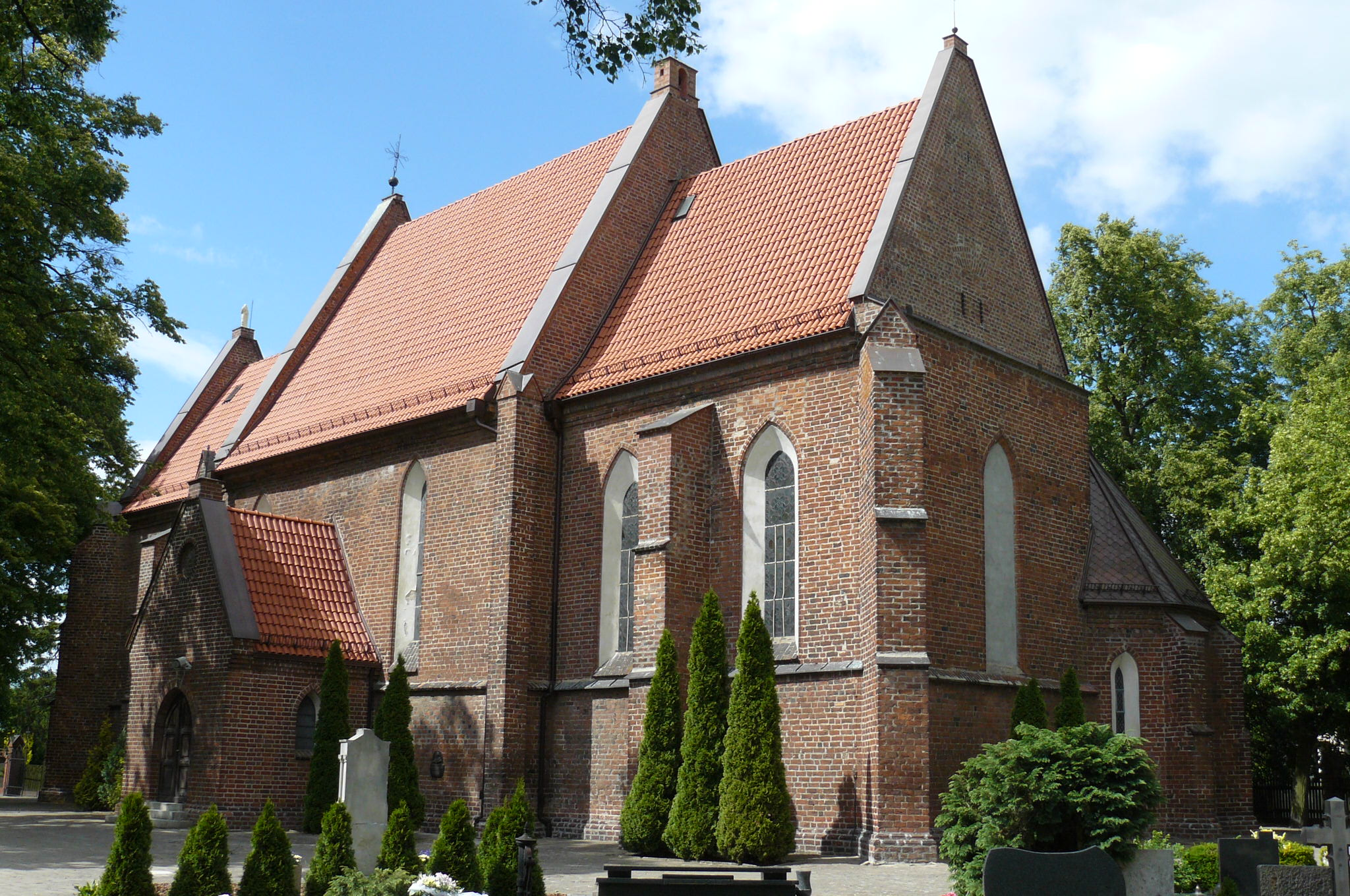 Kościół św. Jakuba na Głuszynie w Poznaniu.